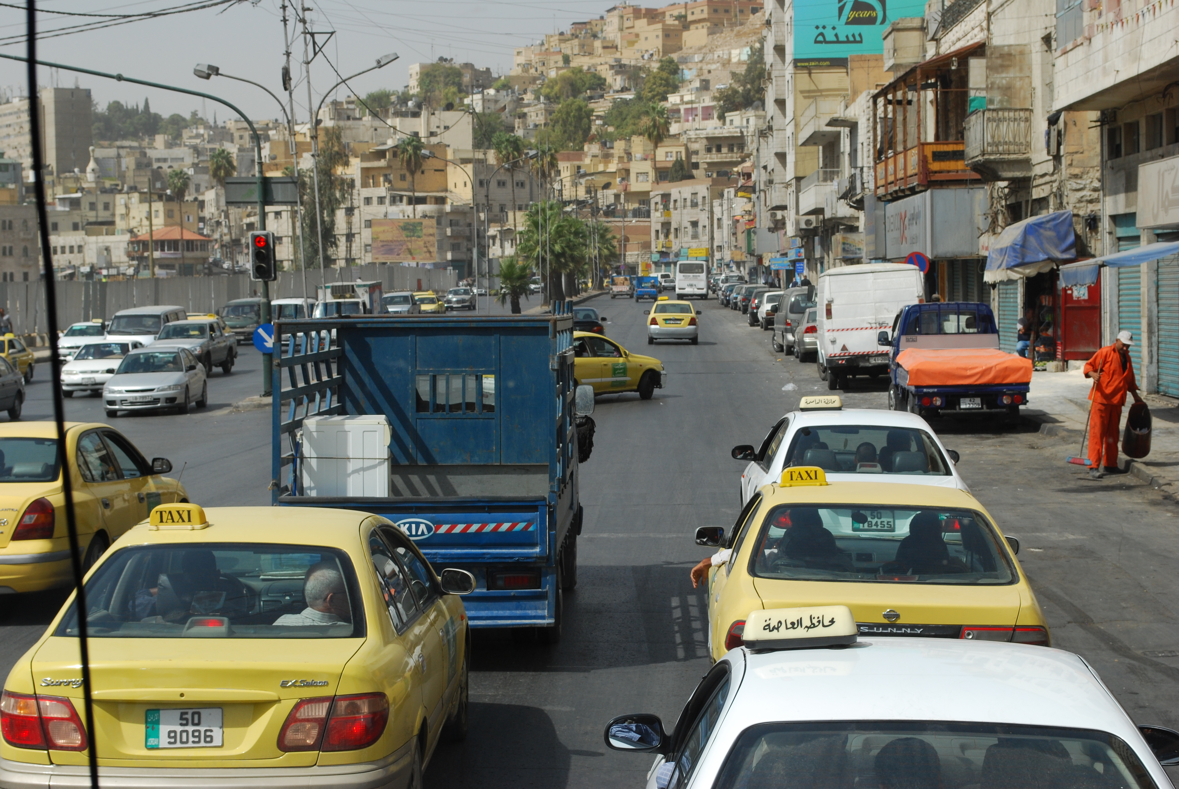 Amman : Al Hashimi Street.